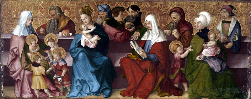 Die Heilige Sippe. Karlsruhe museum